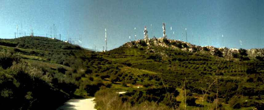 Το κέντρο εκπομπής Ρογδιάς, οπως φαίνεται σε απόσταση 250 μετρα απο αυτό, απο την πλαυρά του Ηρακλείου.